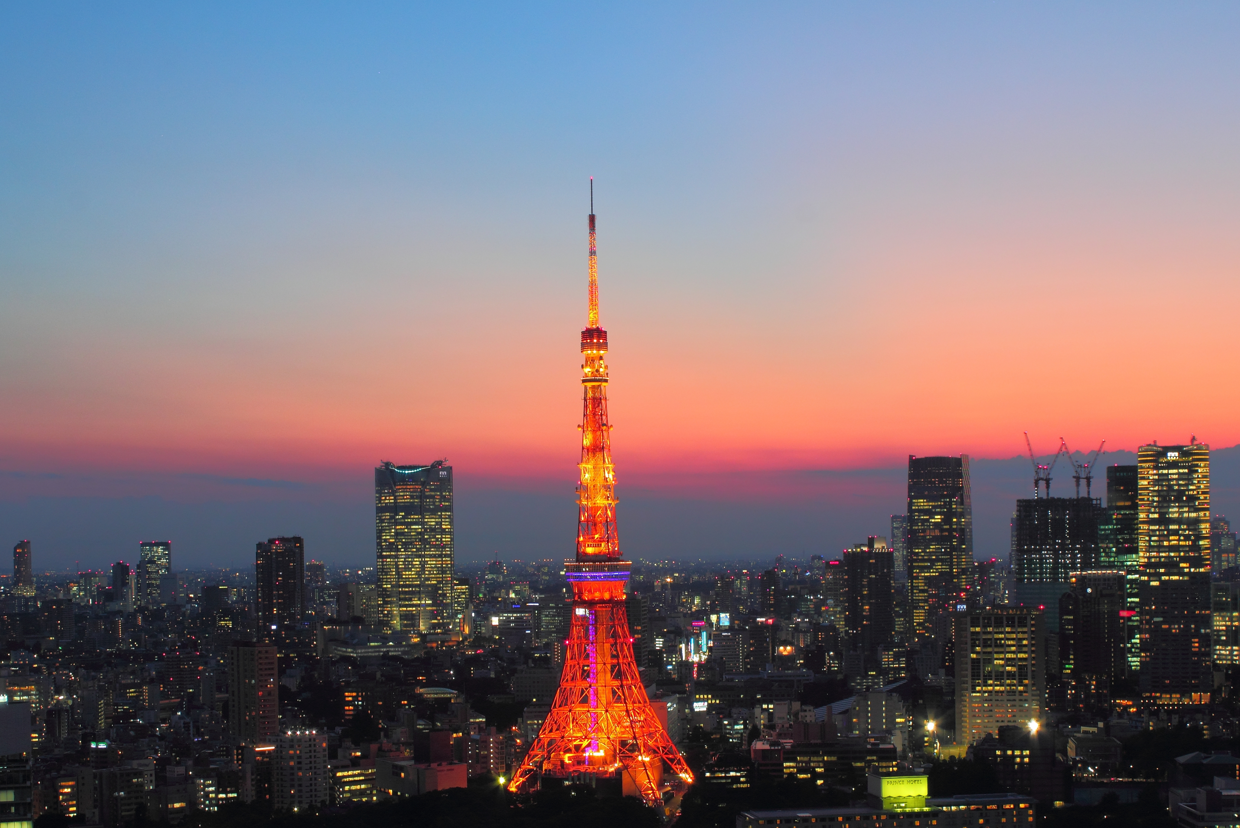 東京タワー夕暮れ（浜松町貿易センタービルより）